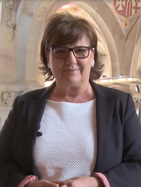 Olga Viza i David Escudé, jurats de l'11a edició del Concurs de Relats Curts Online de TMB